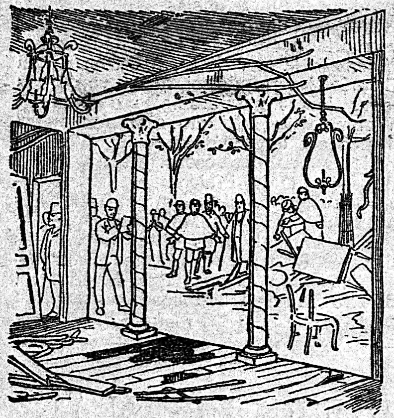 Le restaurant Véry - intérieur